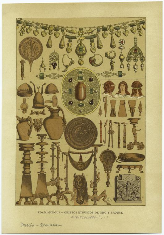 Objetos etruscos de oro y bronce